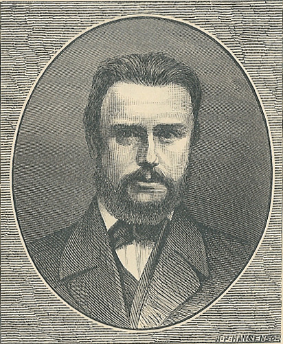 Frederik Dreier, stik efter et fotografi.